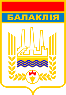 Герб Балаклеи